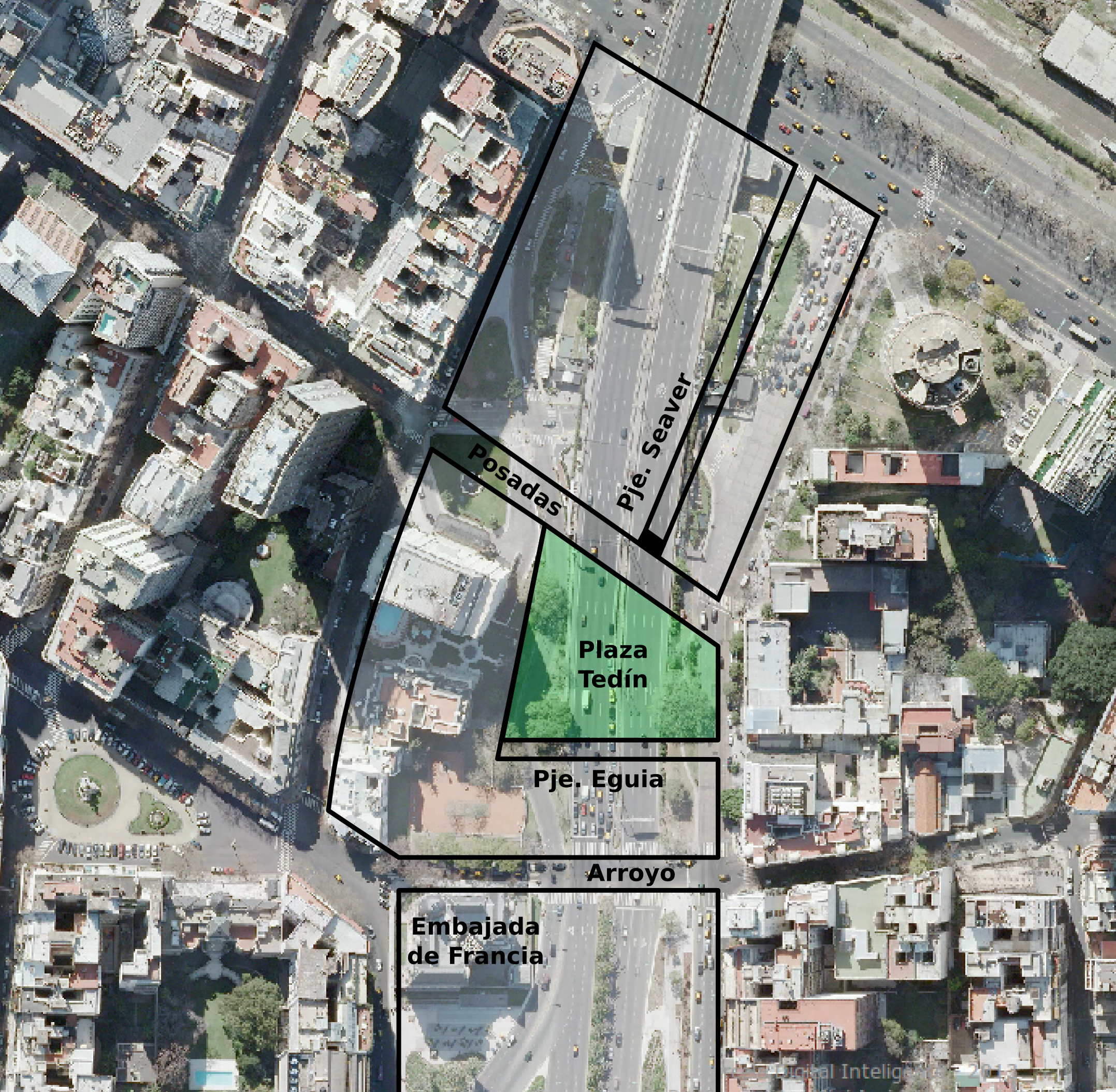 Vista satelital de Retiro, Ciudad de Buenos Aires.